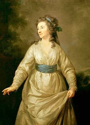 Elisa von der Recke. Porträtiert von Anton Graff vor 1790